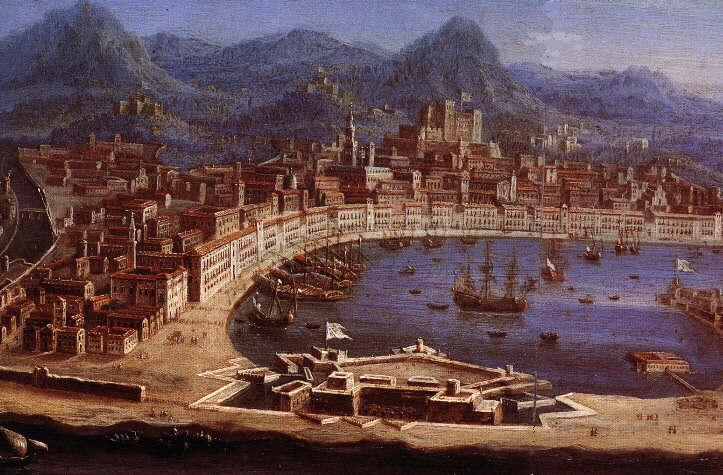 Messina Palazzata Simone Gullì